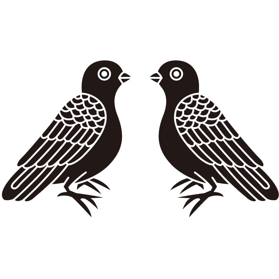 高力氏（桓武平氏貞盛系熊谷氏流）の家紋「対い鳩」